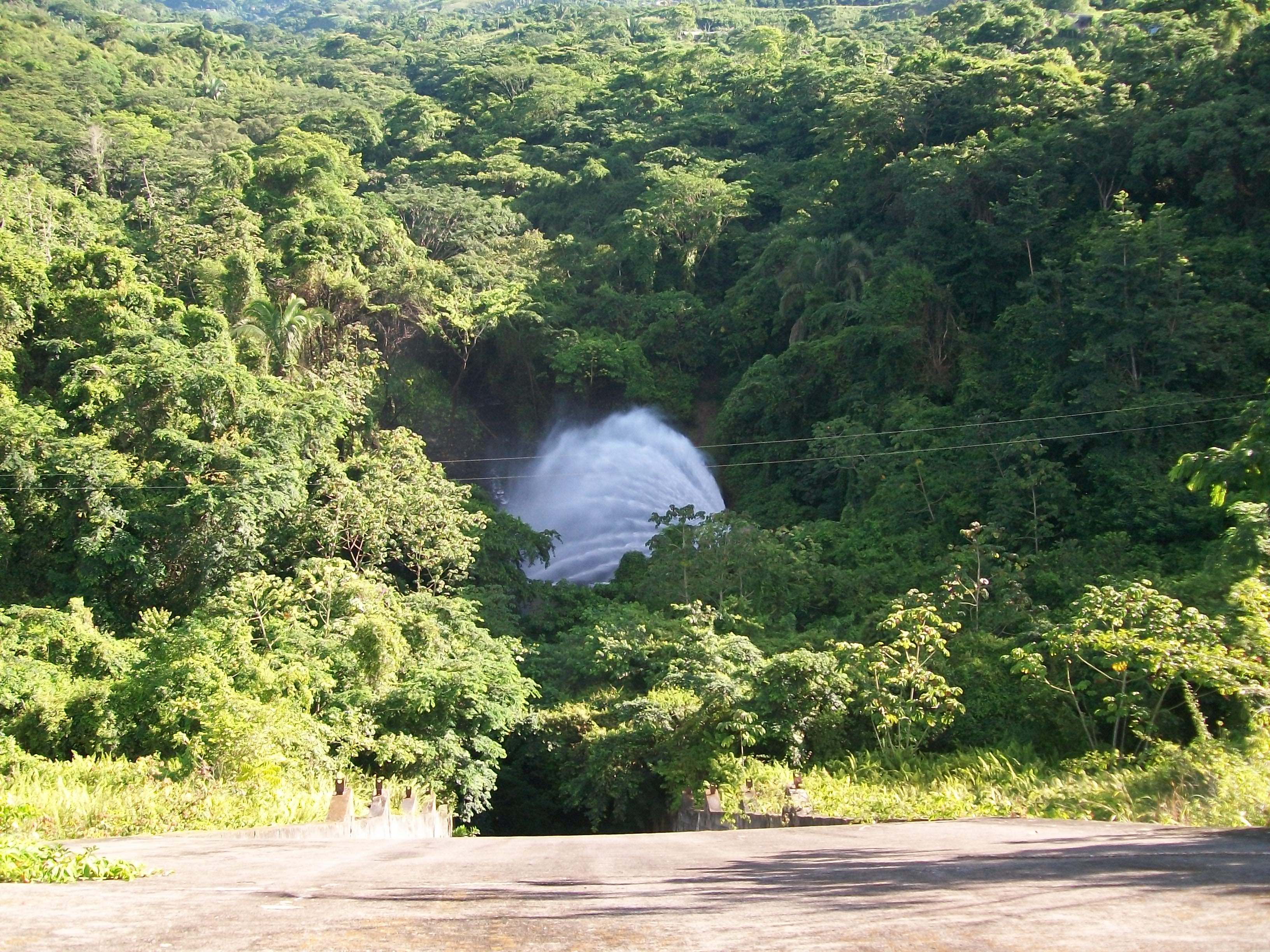 Edo. Carabobo